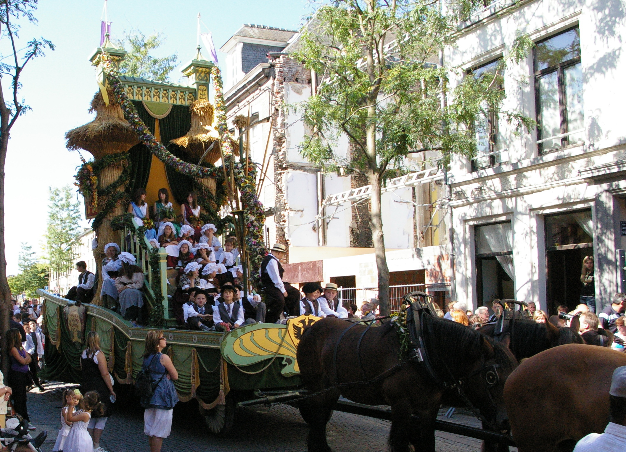 La barque des pecheurs napolitains dans le cortège de la Ducasse d'Ath, 2007